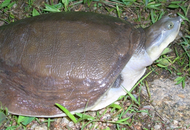 Lissemys punctata, Bannerghatta Bangalore